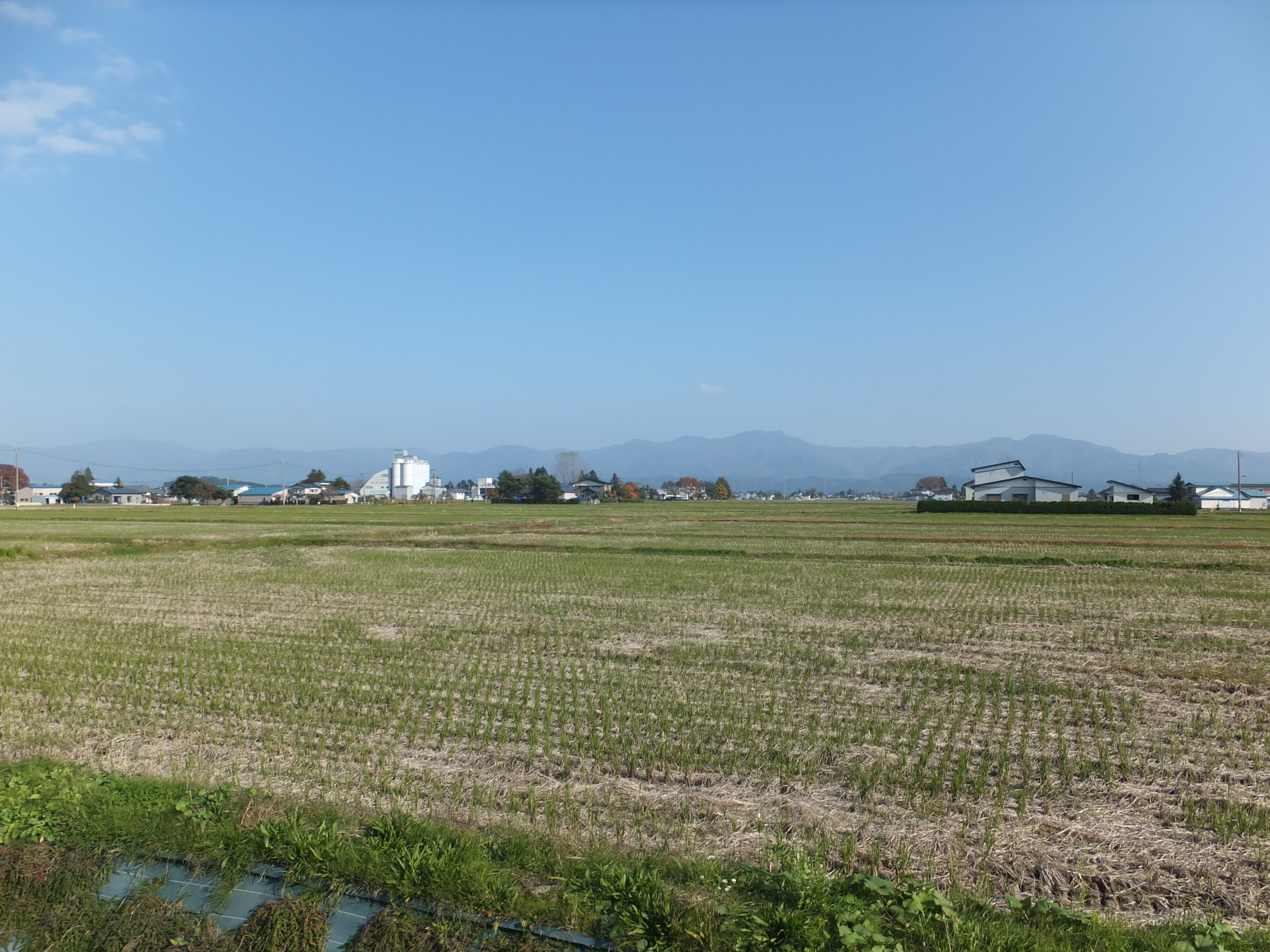 収穫後の仙北平野（秋田県大仙市）